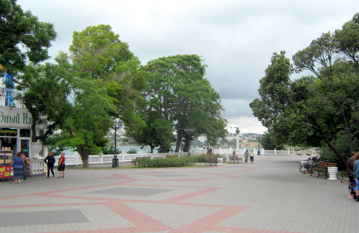 Приморський бульвар у Севастополі